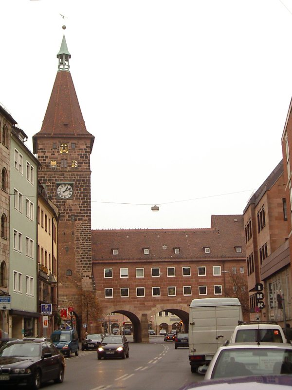 Nürnberg: Laufer Schlagturm, Bestandteil der "Vorletzten Stadtmauer", von W (November 2003)